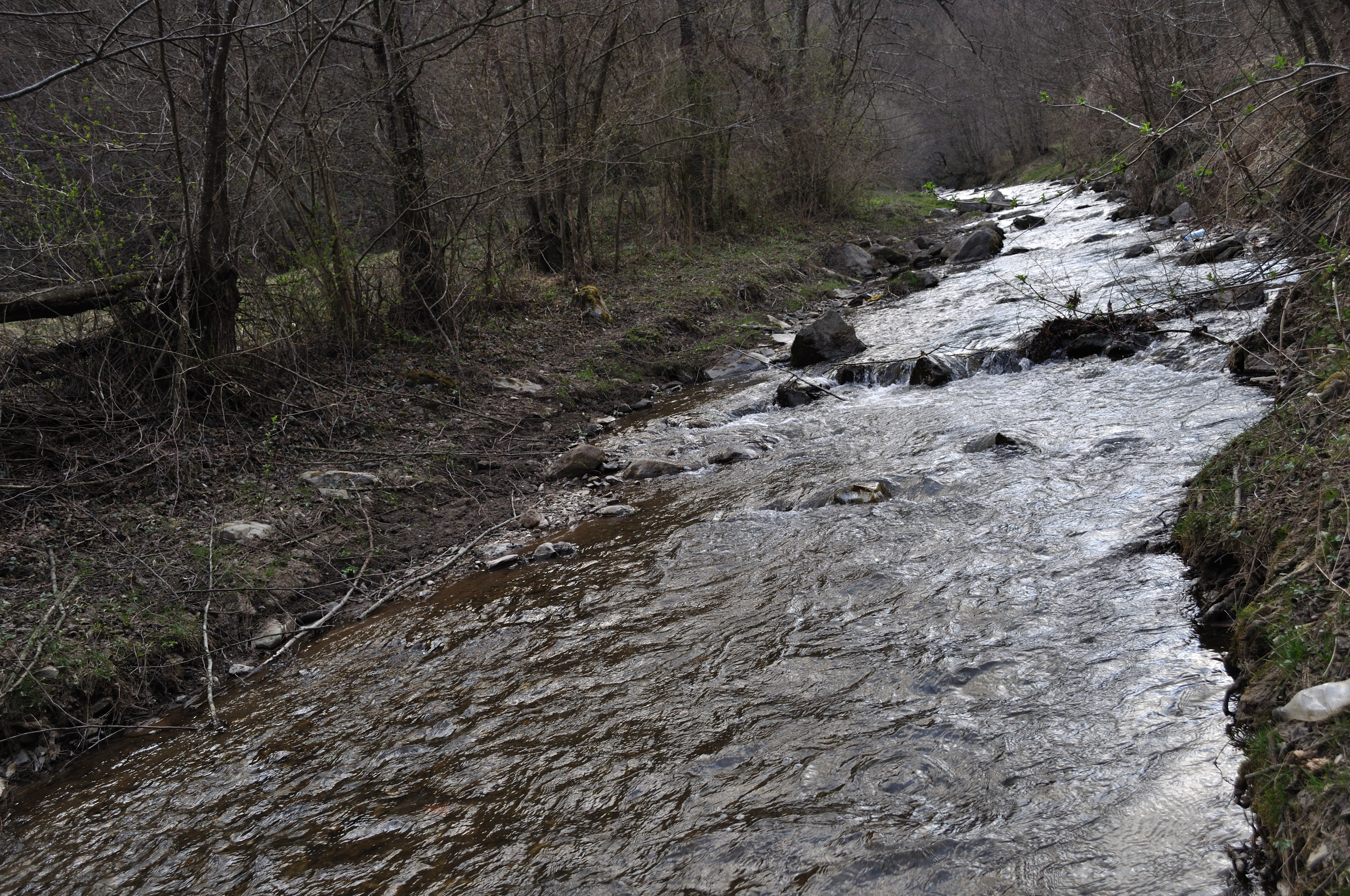 Râul Ocolișel, afluent al Arieșului